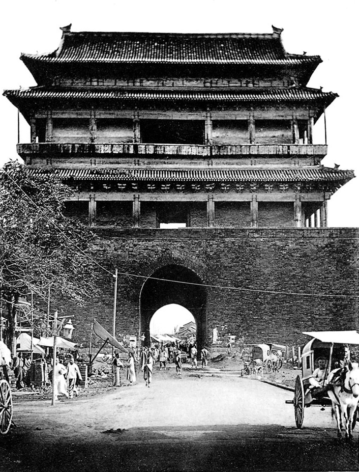 Das Hatamen (Innen-Thurm)